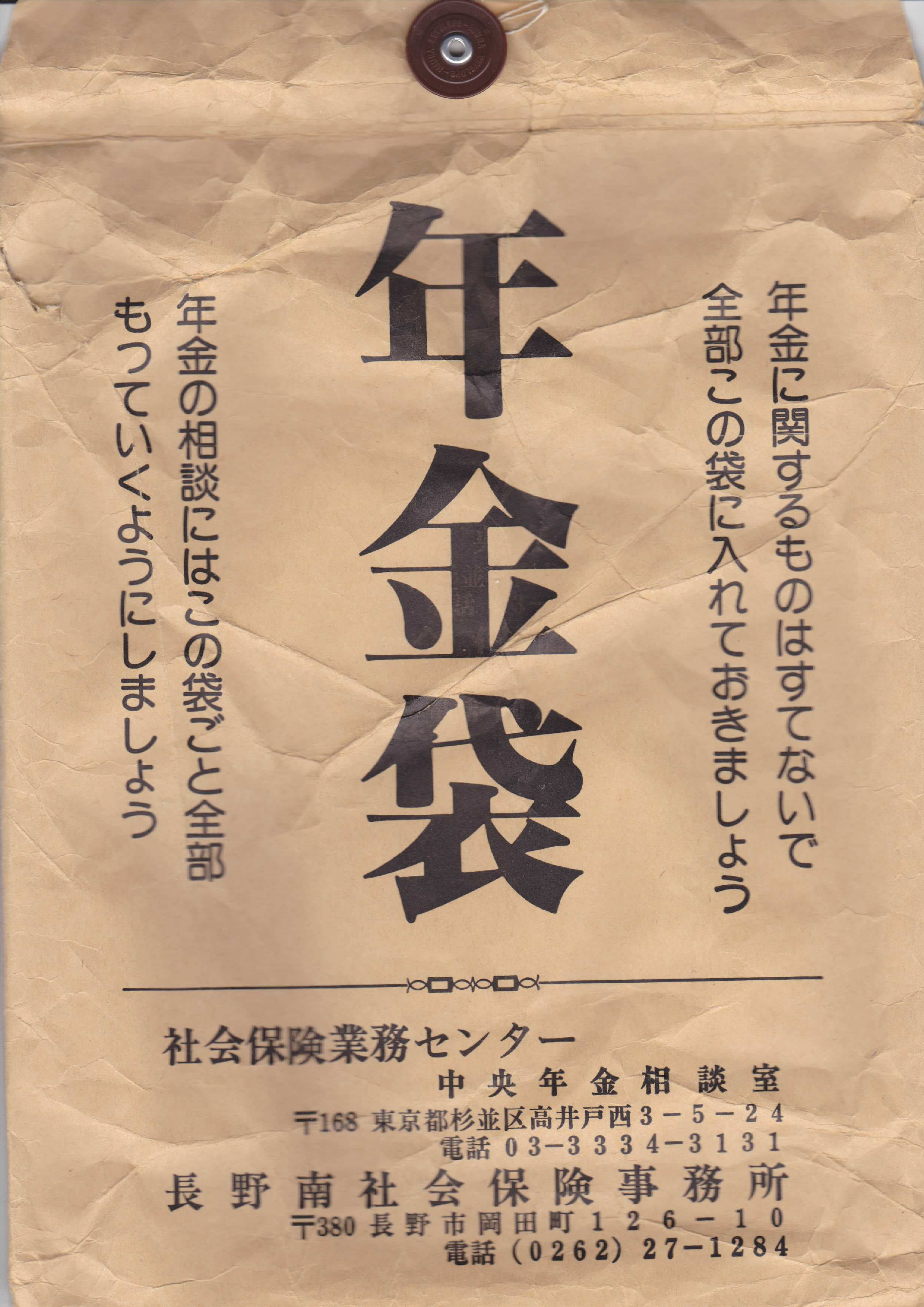 年金関係書類入れ用の封筒